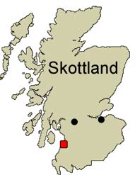 Lite kart som viser hvor Turnberry ligger i Skottland.